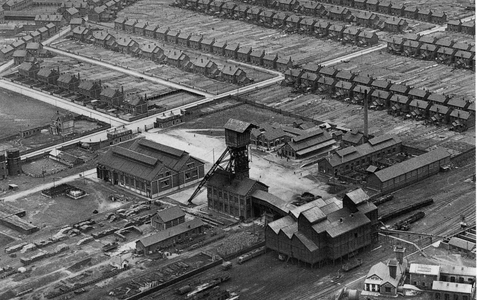 Vue aérienne de la fosse n° 7 - 7 bis de la Compagnie des mines de Bruay, située à Houdain, Pas-de-Calais, Nord-Pas-de-Calais, France.